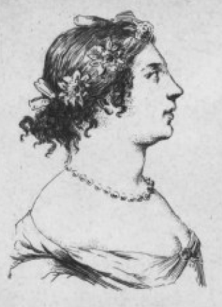 Marie Claveau, dite Mademoiselle Du Croisy, femme de Philibert Gassot, dit Du Croisy, est une actrice française du xviie siècle née à Sainte-Hermine. Elle entre avec lui dans la troupe de Molière en 1659.